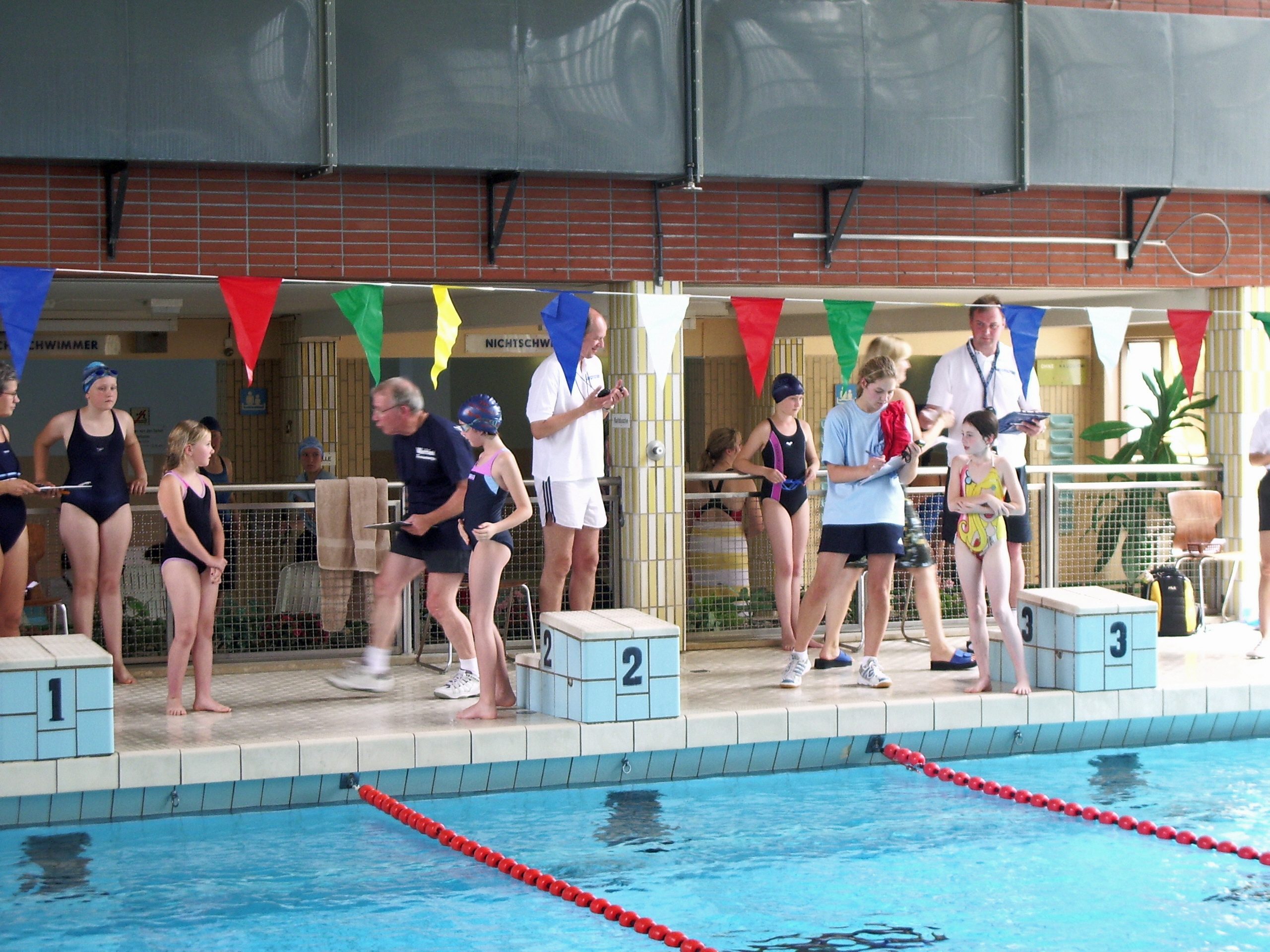 Schwimmvereinsmeisterschat des TSV Uetersen 2007